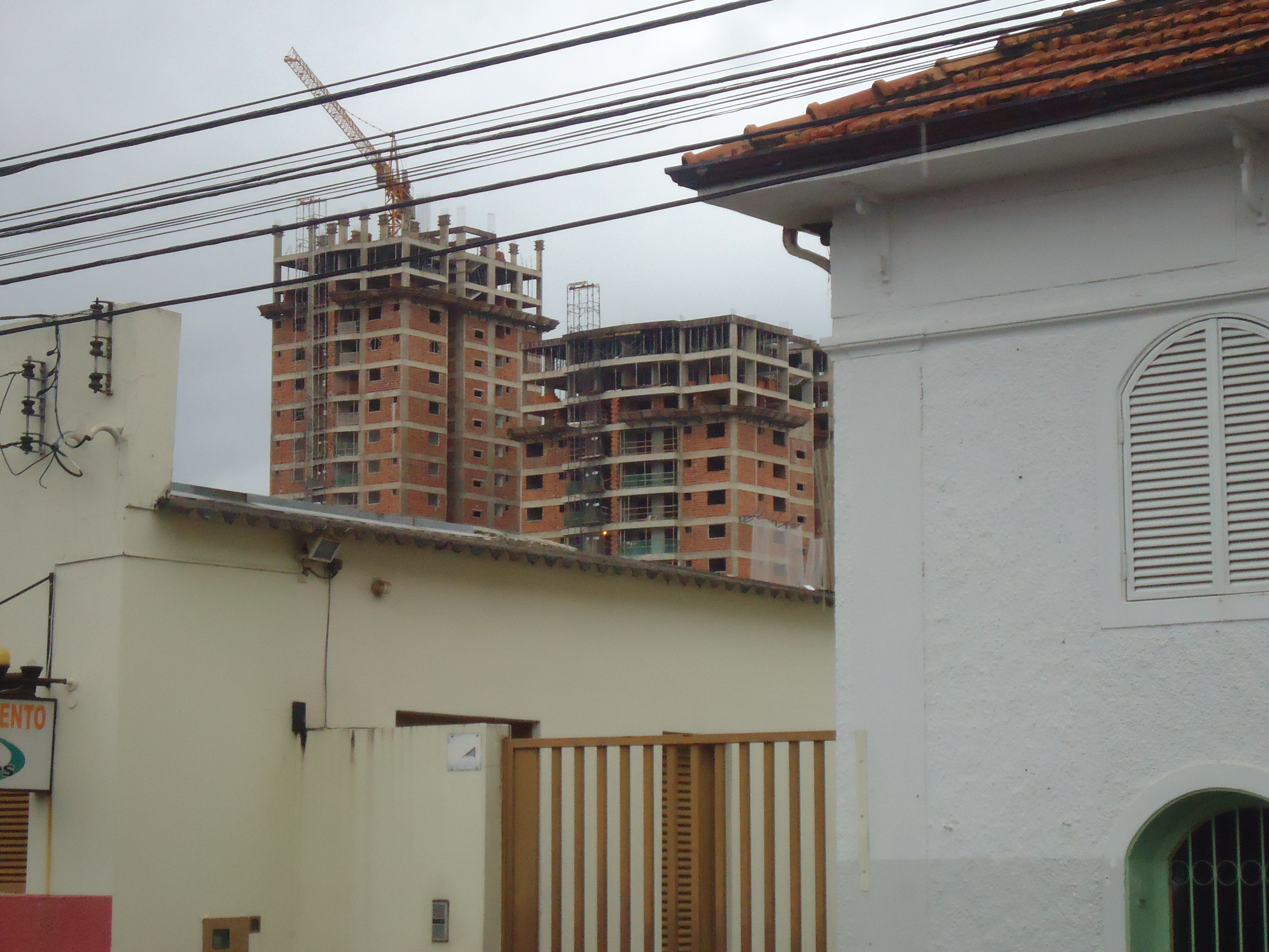 Construção de um condomínio vertical no Centro de Uberlândia